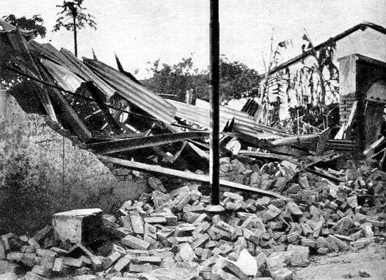 Prédio destruído por bombardeio aéreo do Exército Brasileiro em Guaratinguetá, em setembro de 1932.